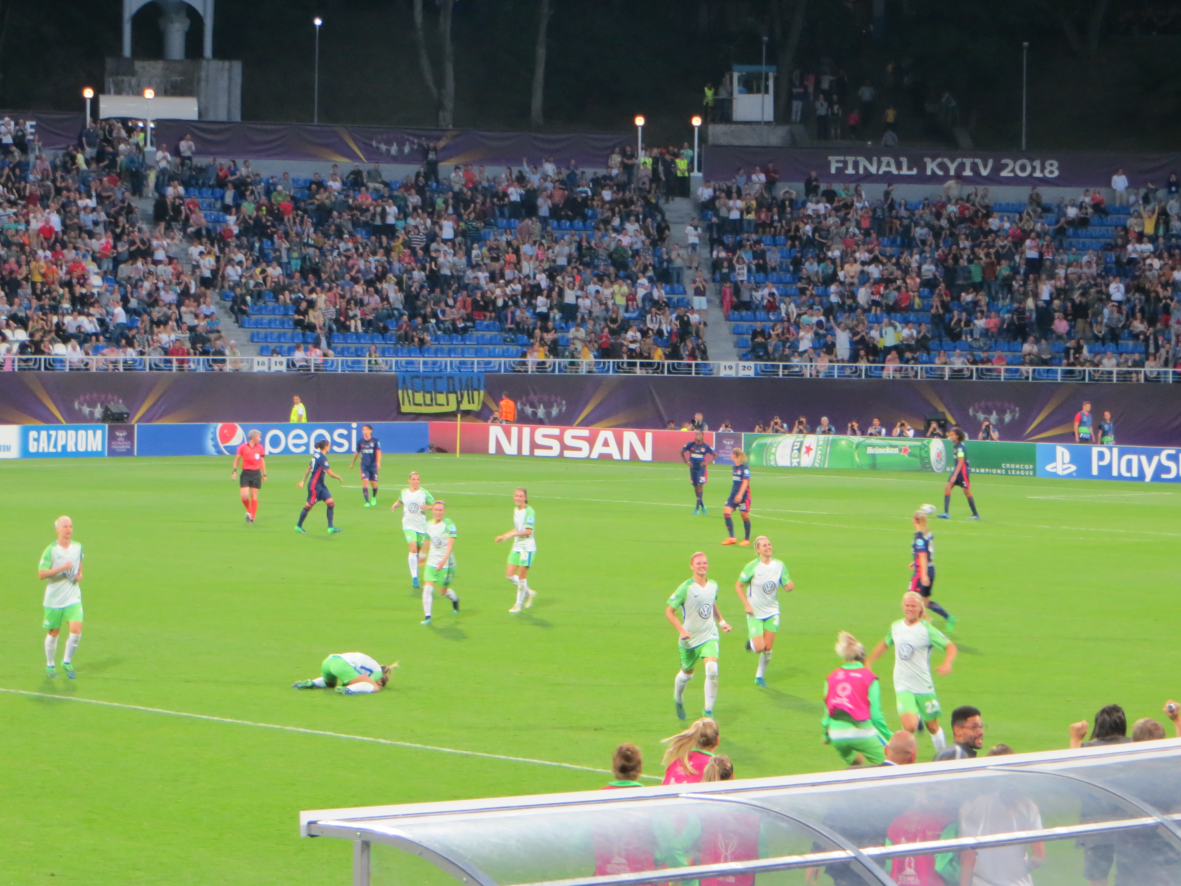 Фінал жіночої Ліги чемпіонів 2018 у Києві. Вольфсбург - Ліон 1:4